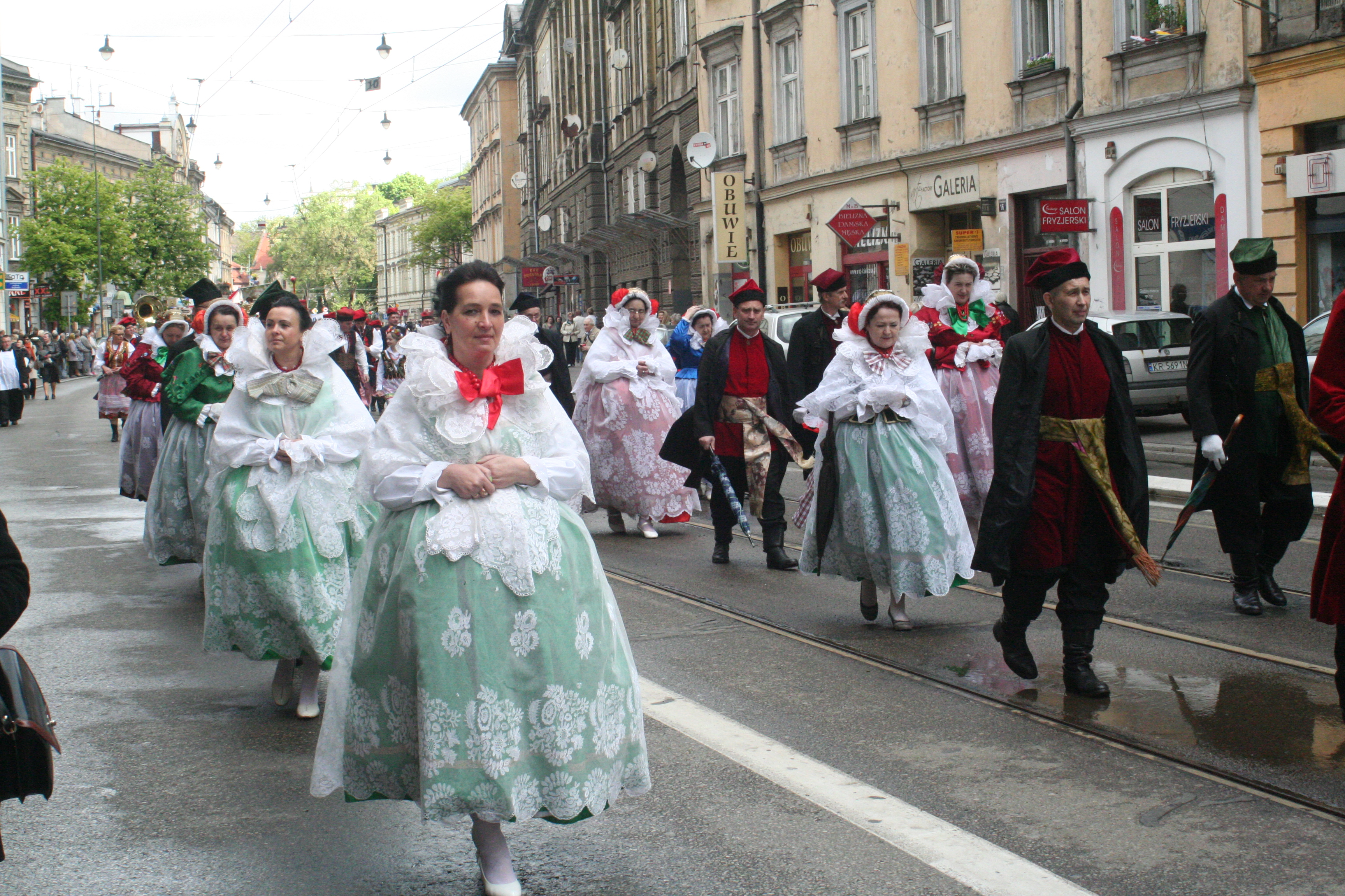 Tradycyjna Procesja ku czci św. Stanisława z Wawelu na Skałkę.